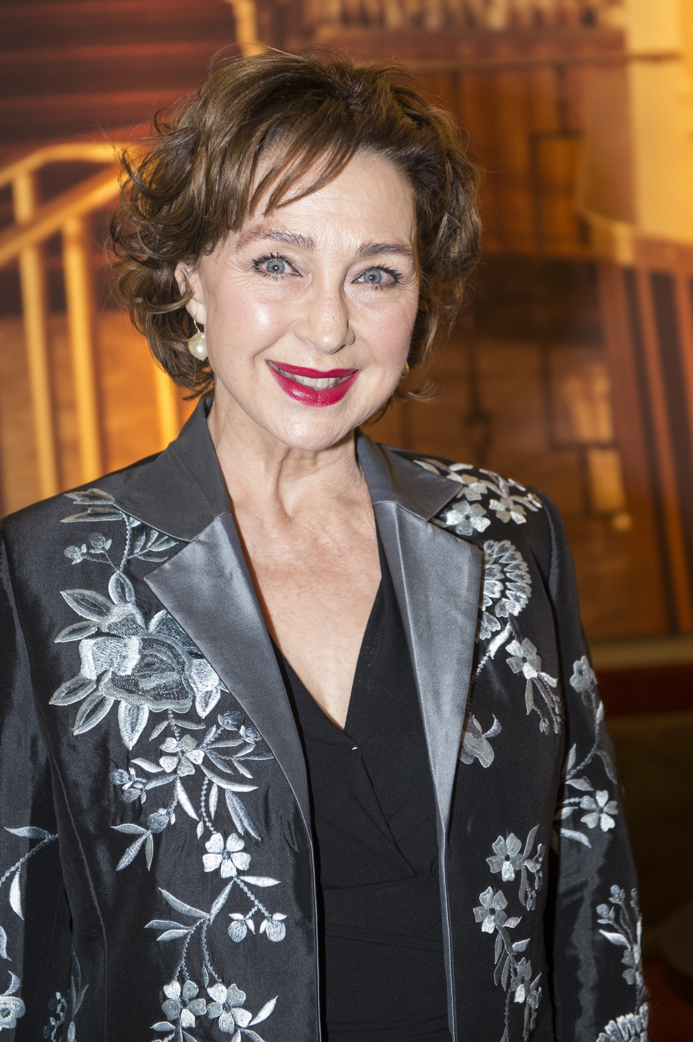 Bretonische Verhältnisse Premiere am 16.04.2014 in München Christine Kaufmann